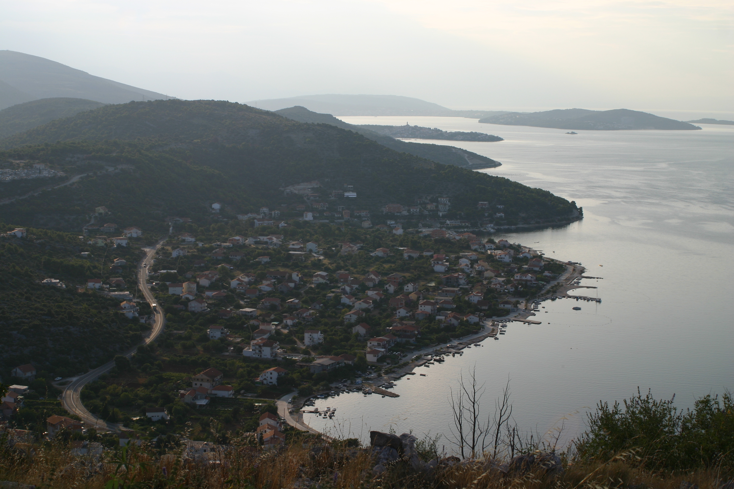 POLJICA WIDOK ZE "ŚNIEŻNEJ"